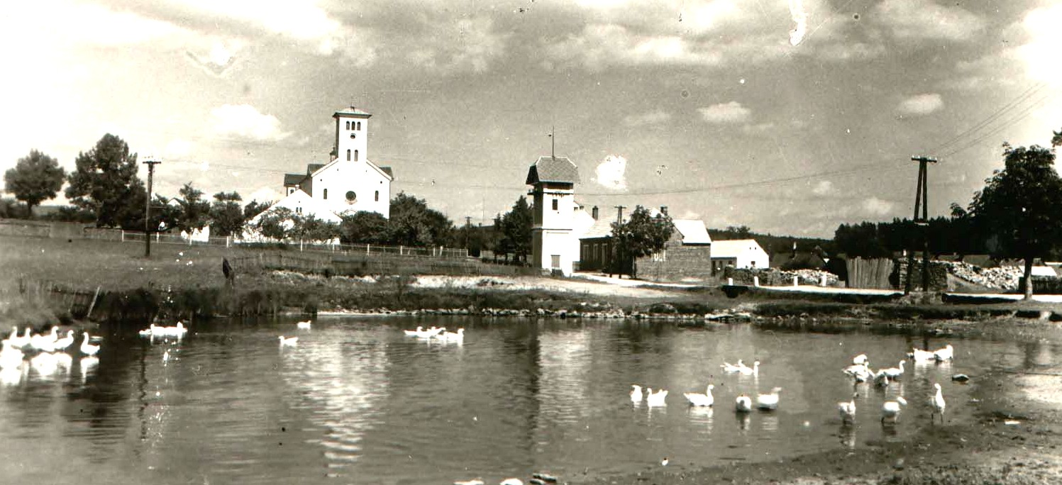 obrázek ukazuje nový transformátor